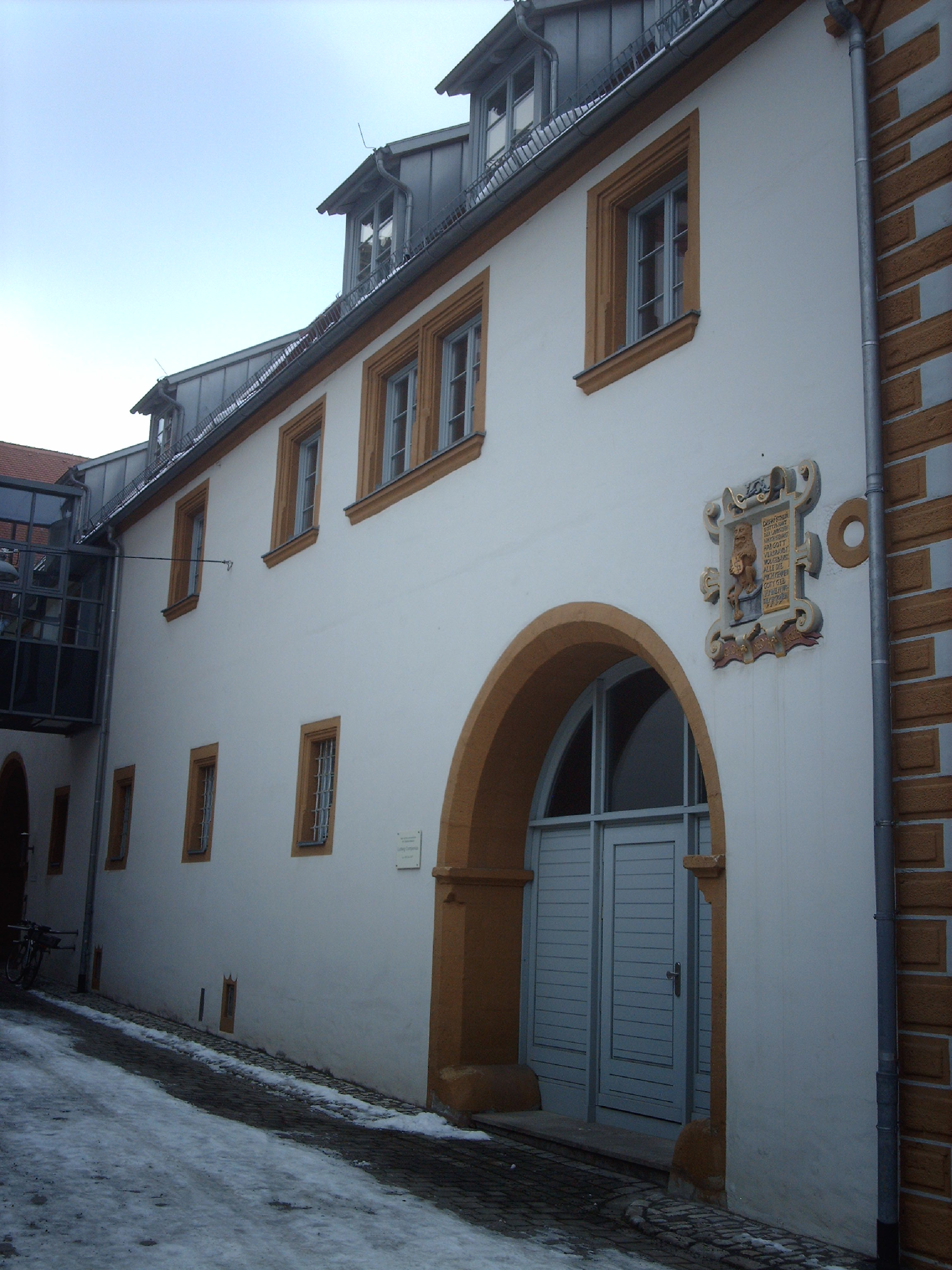 Wohnhaus des Orgelbauers Ludwig Compenius in der Markgrafengasse in Erfurt.